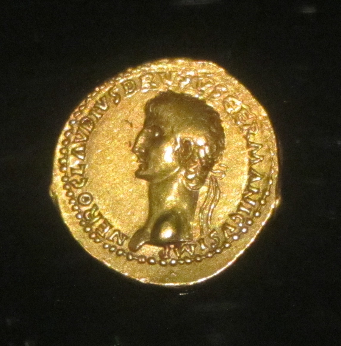 Aureus de Claude D/ NERO CLAUDIUS DRUSUS GERMANICUS IMP Buste de Nero Drusus coiffé d'une couronne de chêne R/ DE GE-R-MA-NIS Vexillum (enseigne) entre deux boucliers, deux paires de lances et deux trompettes Atelier de Lyon 41-42 ap. J.-C. Musée des Beaux-Arts de Lyon, inv. X 618-4